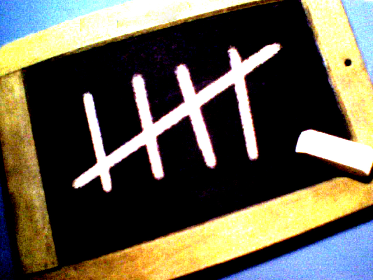 Tablerito donde aparece el conteo clásico de 5